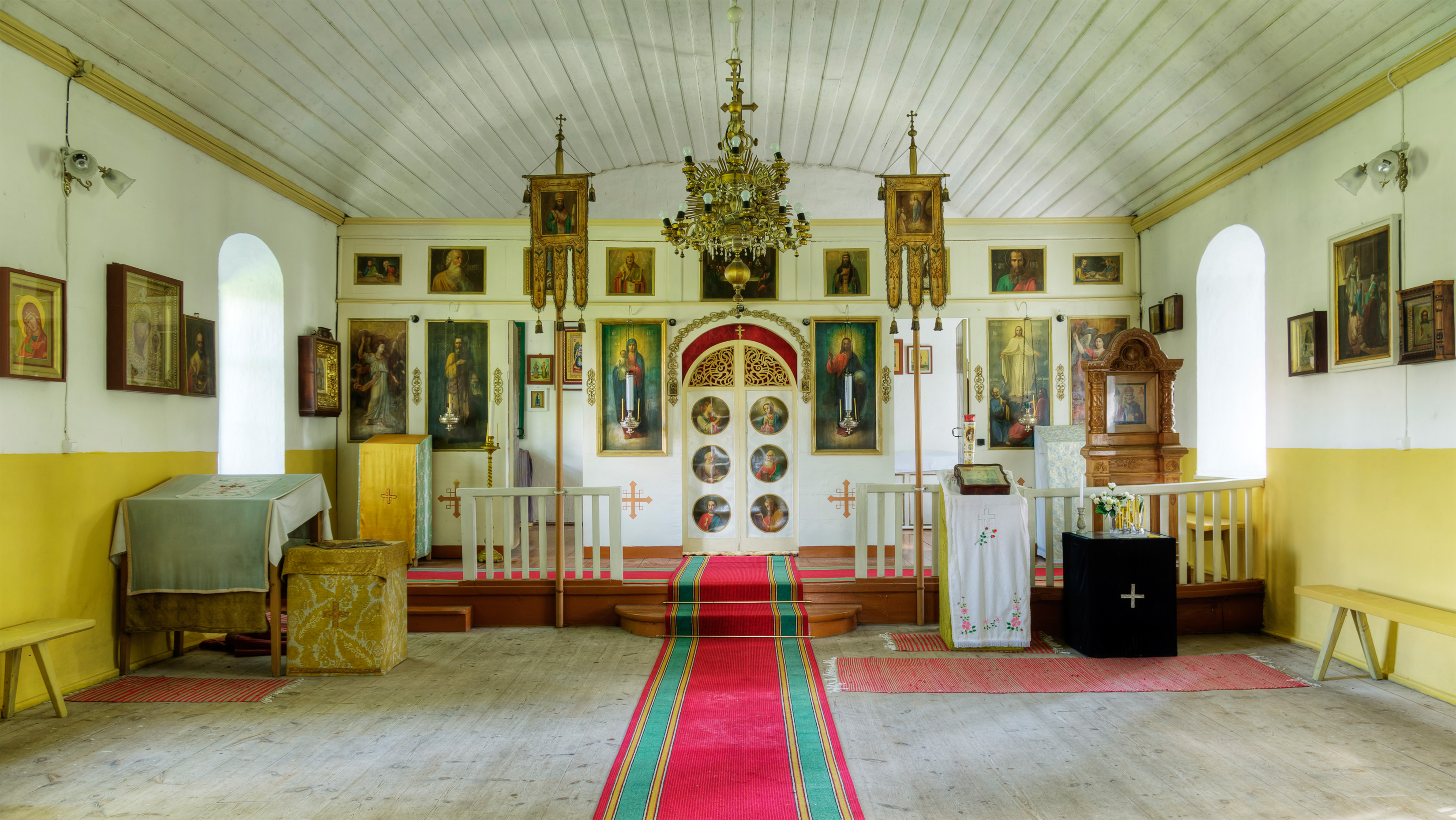 Lümanda Issanda Muutmise kirik Saaremaal. Sisevaade.